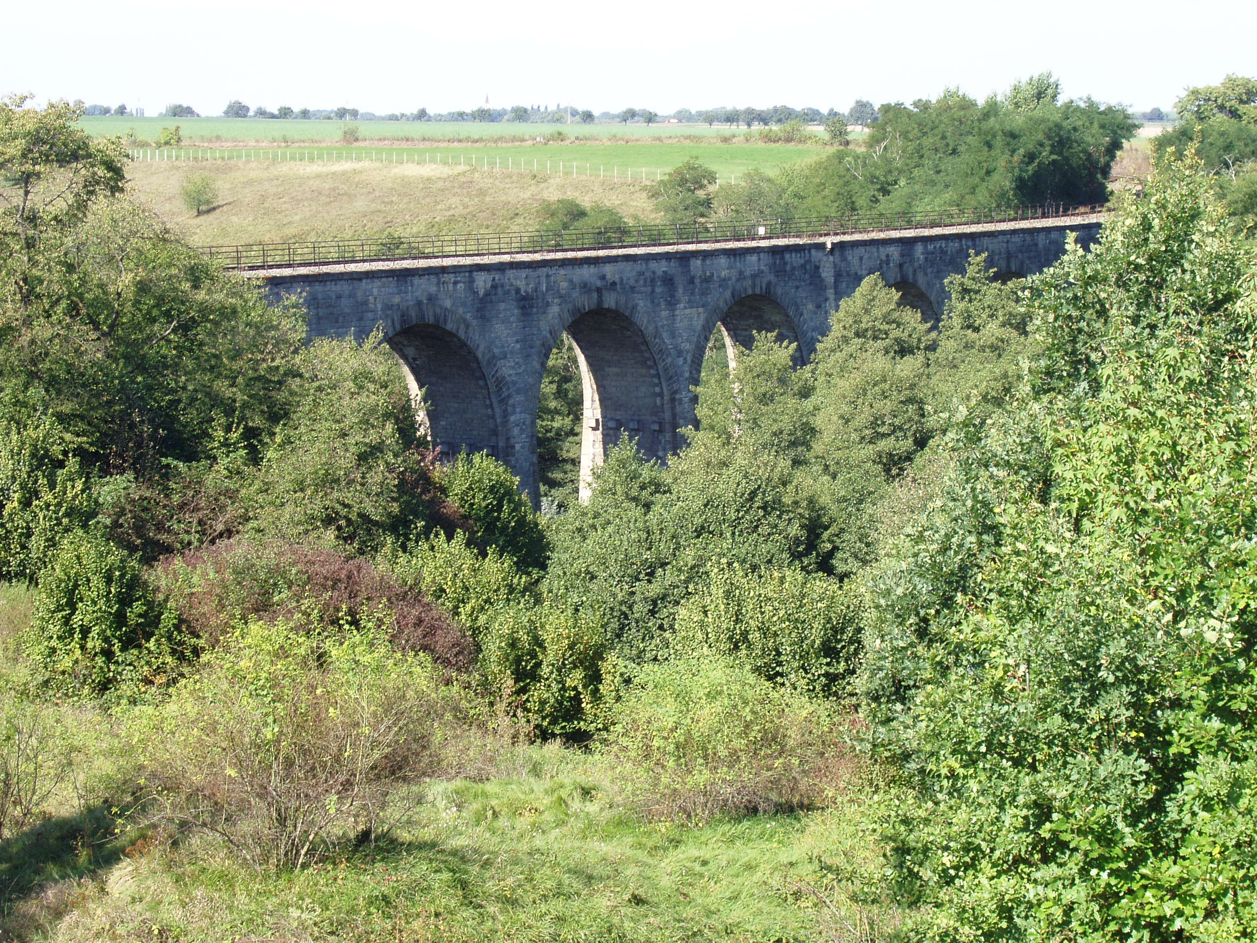 Železniční most mezi stanicemi Červené Pečky a Ratboř, přes údolí Chotouchovského potoka, Bohouňovice I